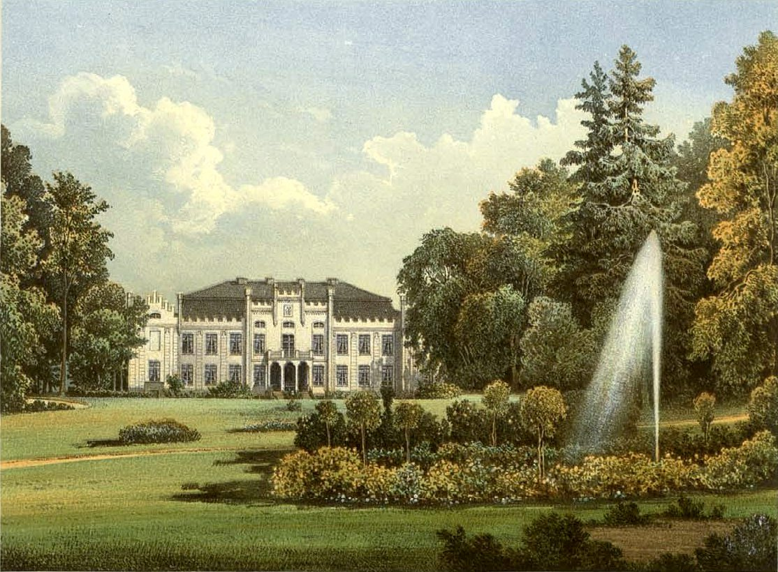 Rittergut Klein-Katz, Kreis Neustadt in Westpreußen, Provinz Westpreußen